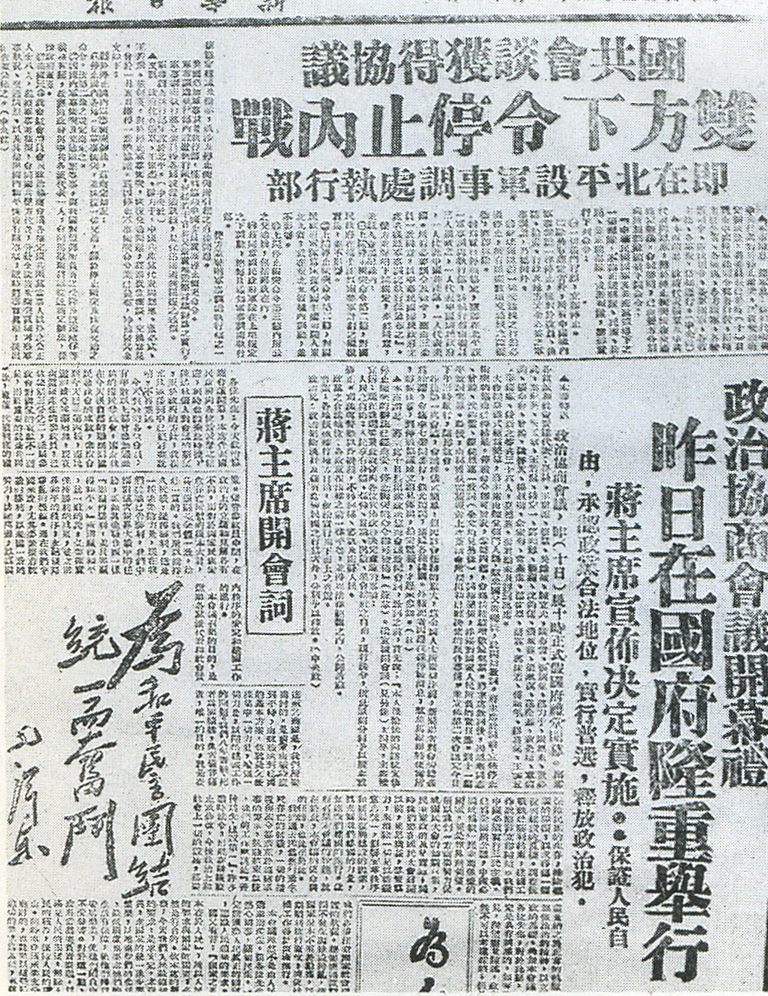 Xinhua Ribao